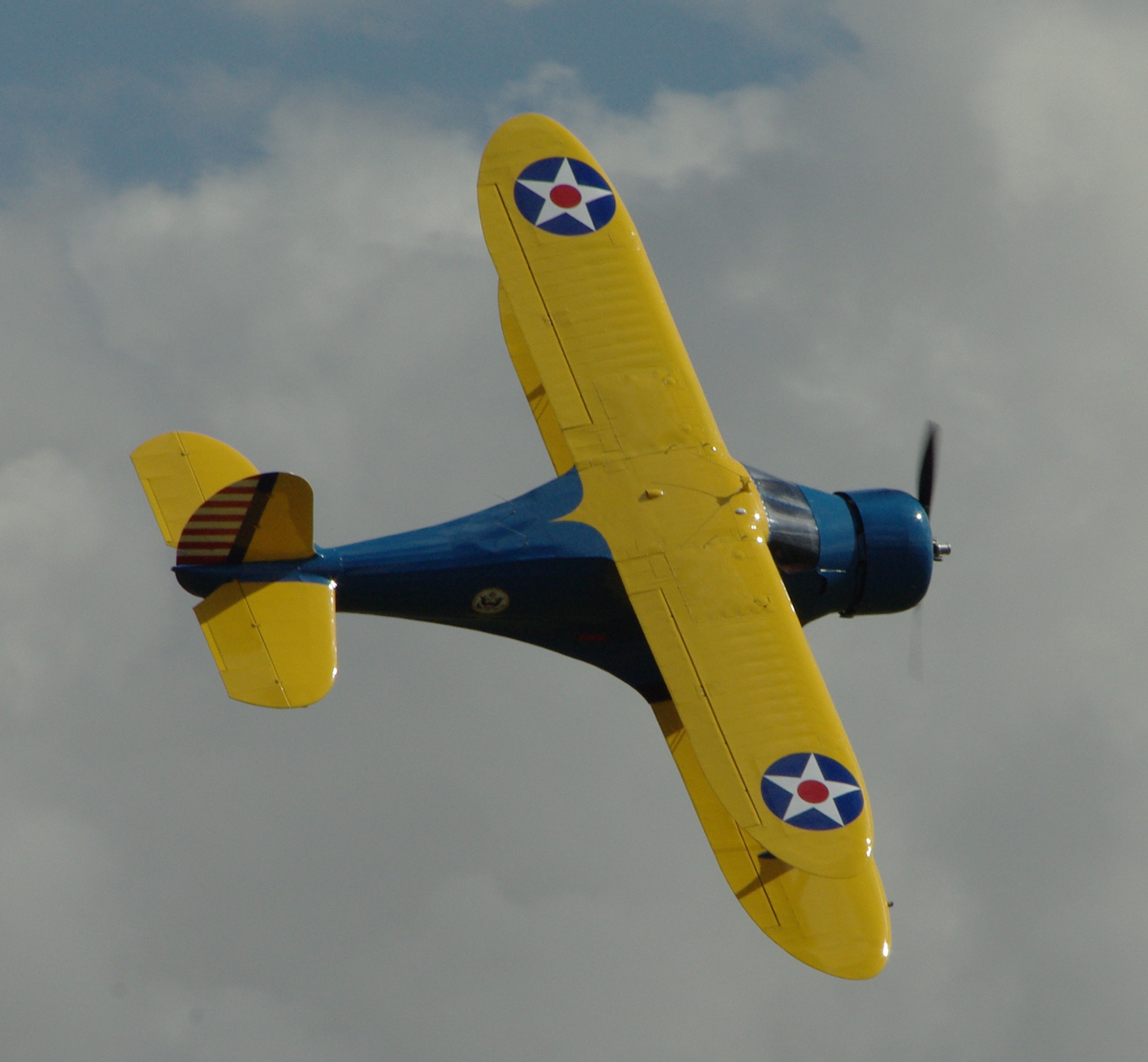 Beech YC-43 Traveller (N296BS) at Flying Legends, Duxford 2009